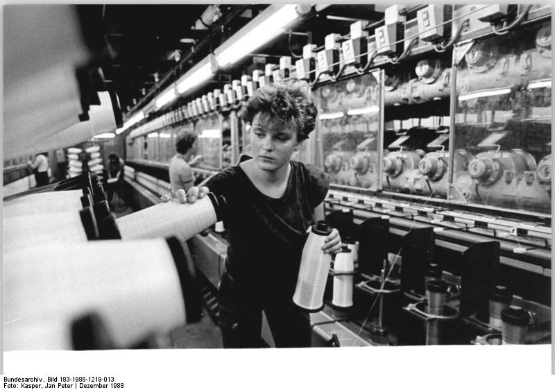 ADN-ZB-Kasper 19.12.1988 Bez. Gera: Im Probebetrieb laufen die ersten vier Kontinuespinnmaschinen im Kunstseidewerk "Clara Zetkin". Bisher zeitlich und räumlich getrennte Verfahrensschritte zur Herstellung der Viskoseseide werden jetzt in einem kontinuierlichen Prozeß vereint. Im stabilen Dauerbetrieb ab Januar 1989 soll im nächsten Jahr im Kontinuespinnverfahren 240 Tonnen Viskosefeinseide erzeugt werden. Das im Elsterberg realisierte Investitionsvorhaben reiht sich ein in das Zentrale Jugendobjekt "Intensivierung der Produktion hochveredelter Chemiefaserstoffe".